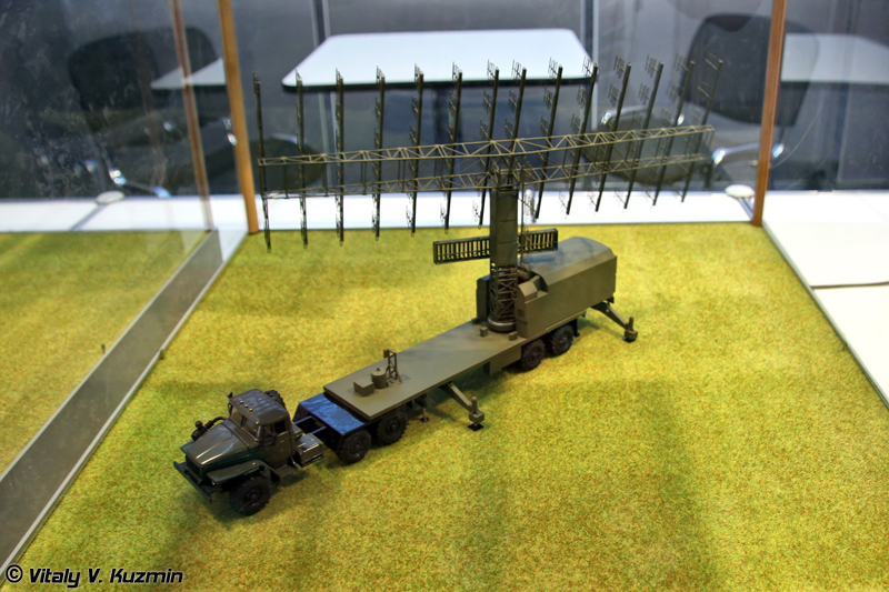 Наземная радиолокационная станция Небо-СВУ (Nebo-SVU radar station)